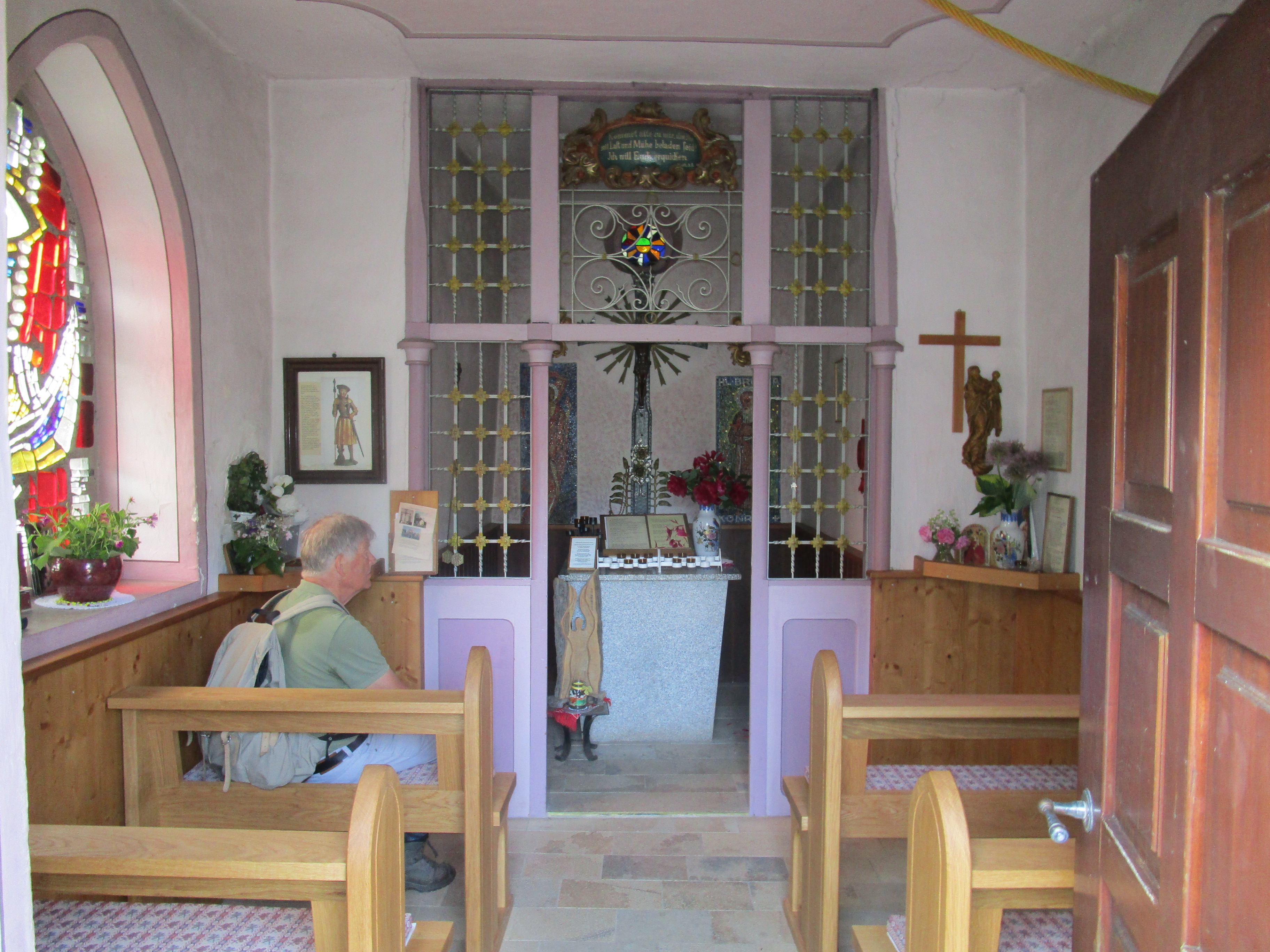 Die Quirinskapelle Gosheim wurde im Jahr 1858 oberhalb von Gosheim in der Schwäbischen Alb in einer Höhe von 987 Metern an der heutigen Kreisstraße 5905 von Gosheim nach Böttingen errichtet. An der Kapelle führt der Schwäbische-Alb-Nordrand-Weg vorbei.